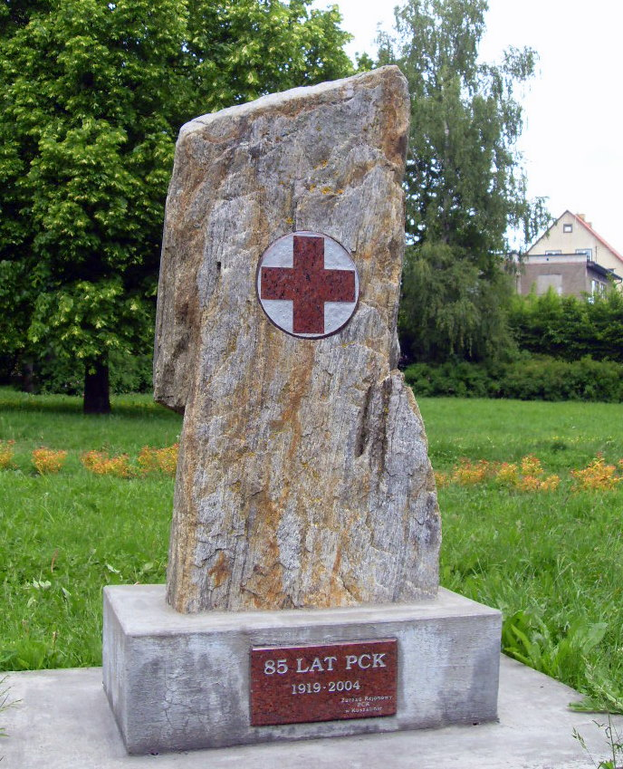 Pomnik Polskiego Czerwonego Krzyża w Koszalinie, na placu o tej samej nazwie.